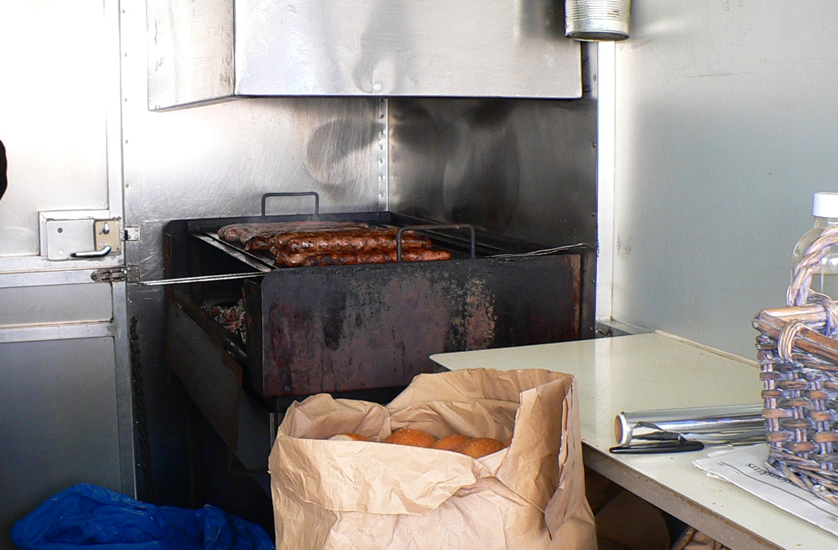 Grill für die “Coburger Bratwurst“, kulinarische Spezialität in Coburg (Oberfranken - Deutschland).